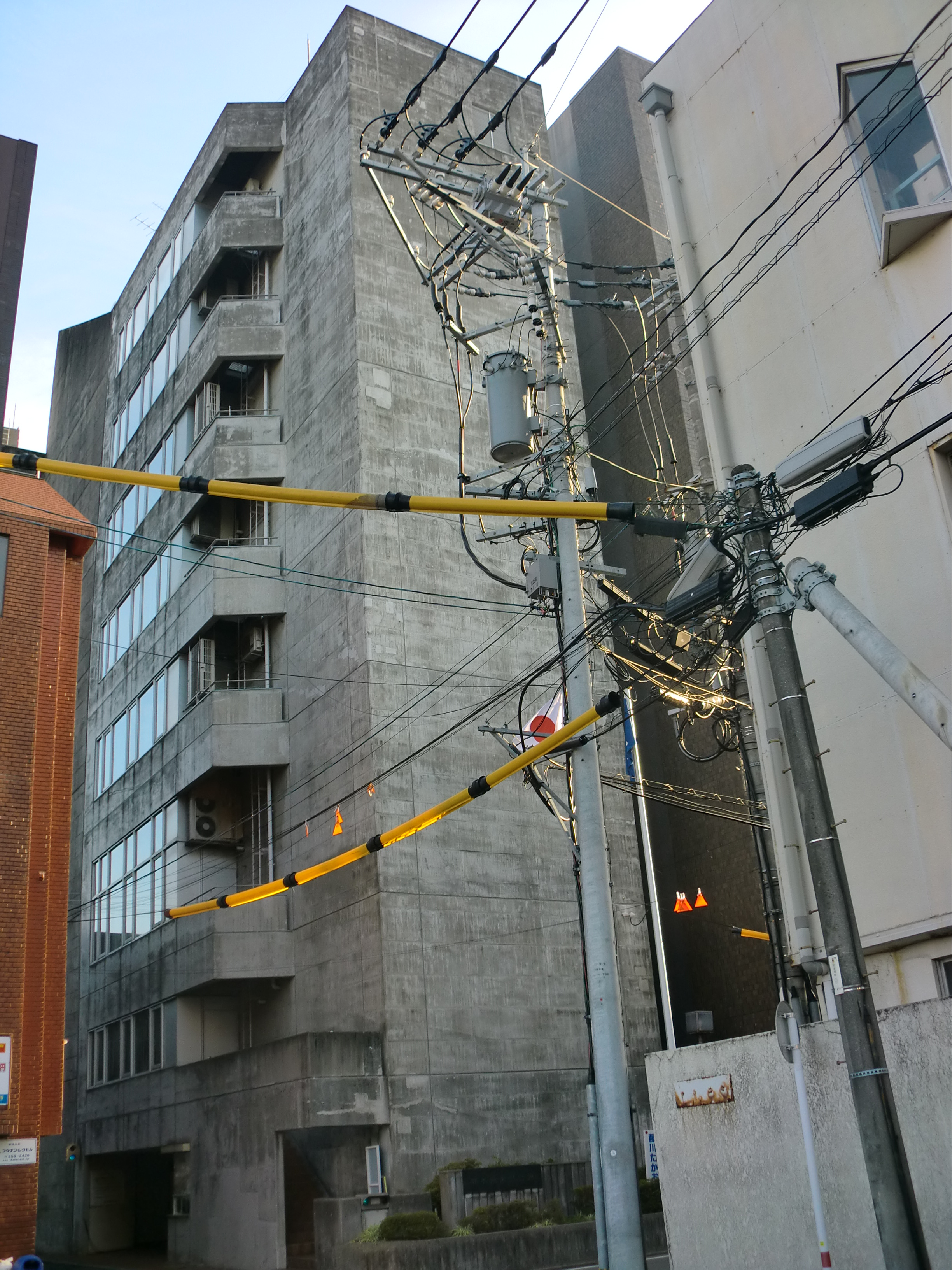 熊本市中央区にある熊本県医師会館